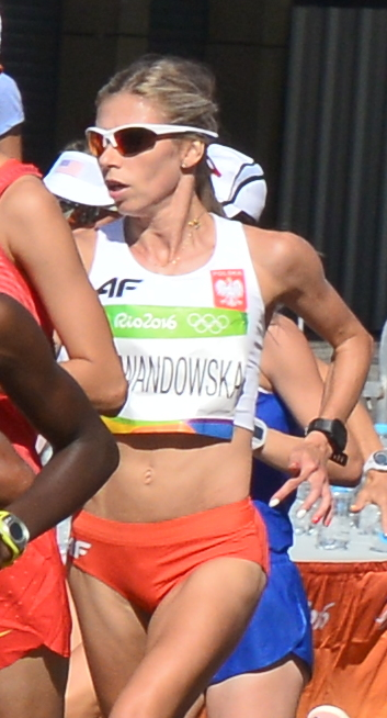 Passage du marathon des jeux olympiques de Rio 2016 dans le centre de Rio